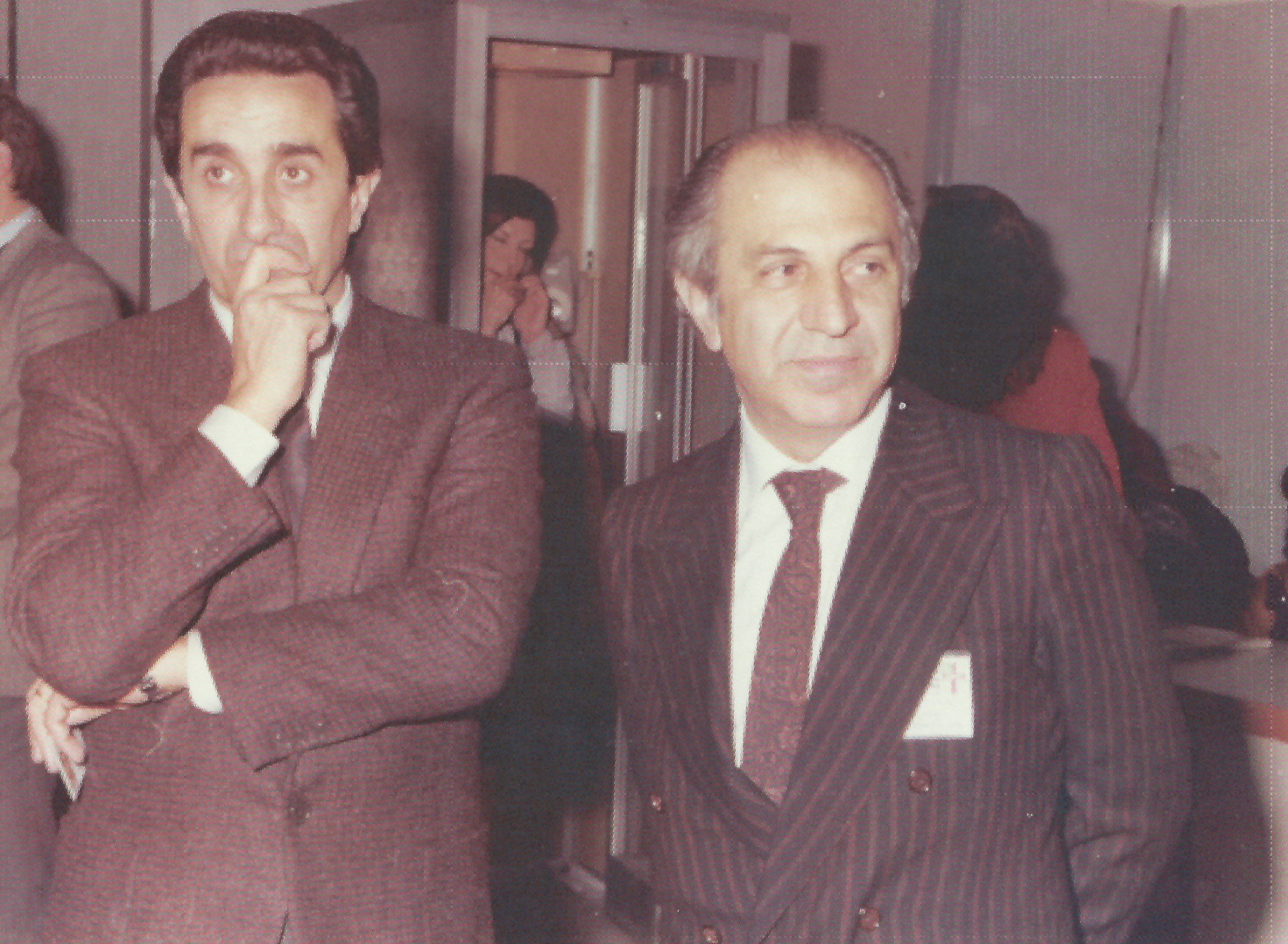 Roma, febbraio 1984. 16° Congresso Nazionale della Democrazia Cristiana. L' on. Rino Nicolosi insieme all' on. Benedetto Vincenzo Nicotra